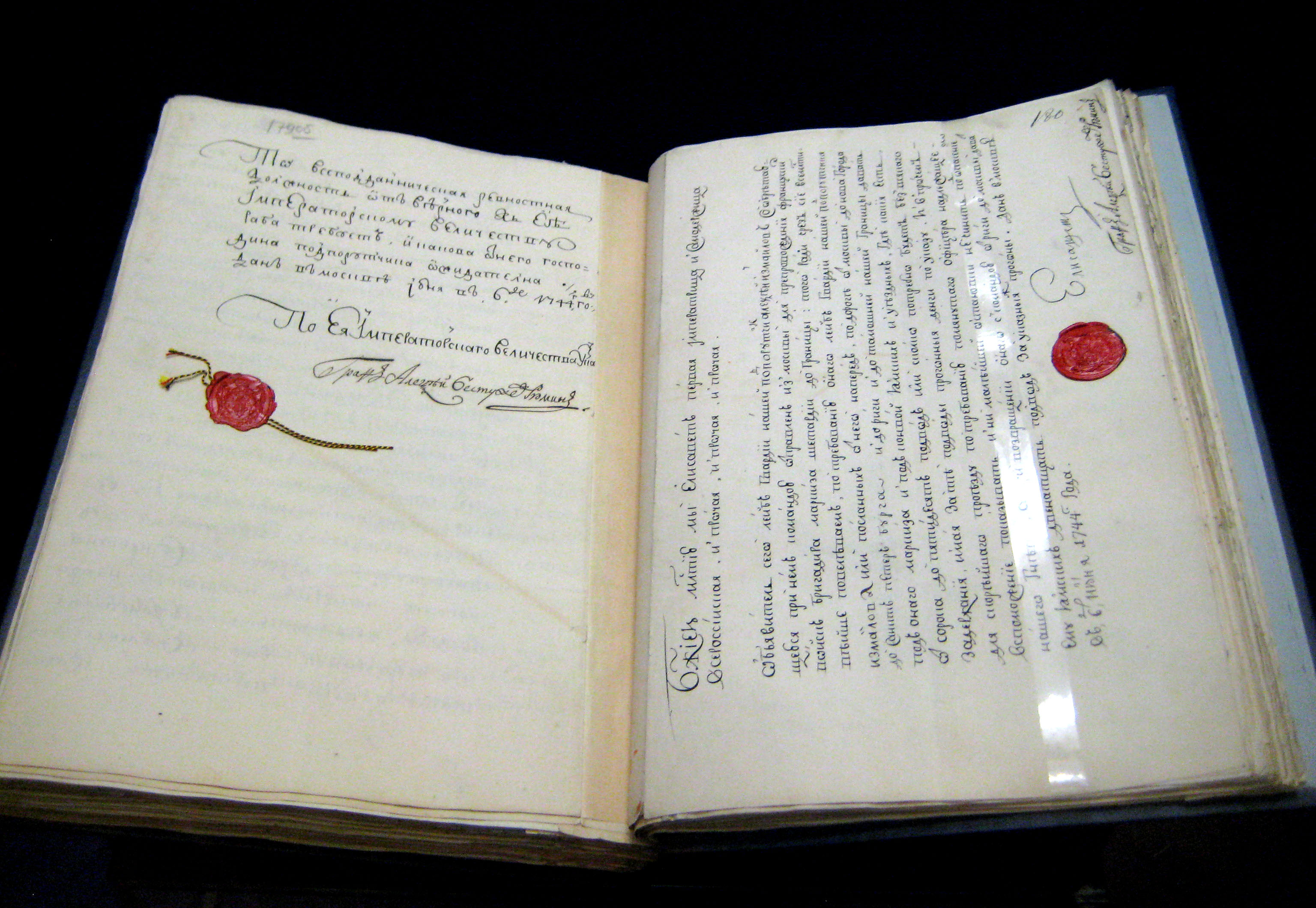 Дело о высылке из России французского посла маркиза Ж.И. Тротти де ла Шетарди. Июнь 1744. Автографы Елизаветы Петровны и А.П. Бестужева-Рюмина. Оттиск государственной печати. РГАДА.